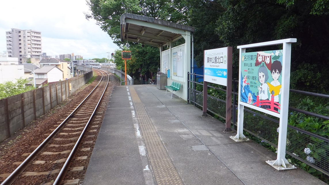 香川県高松市中野町 JR四国高徳線 栗林公園北口駅ホーム